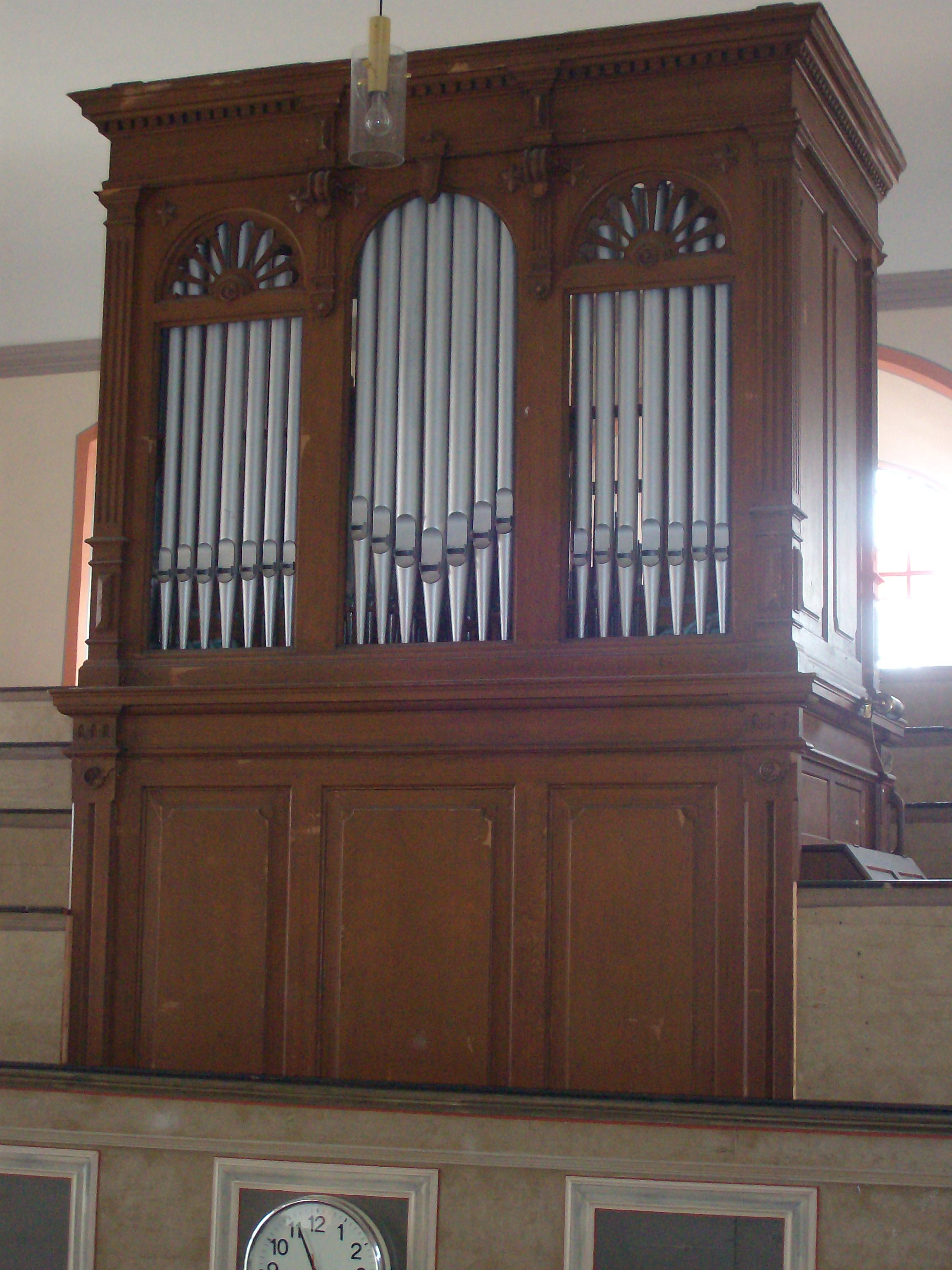 Hospitalkirche Grünberg, Landkreis Gießen, Hessen, Deutschland